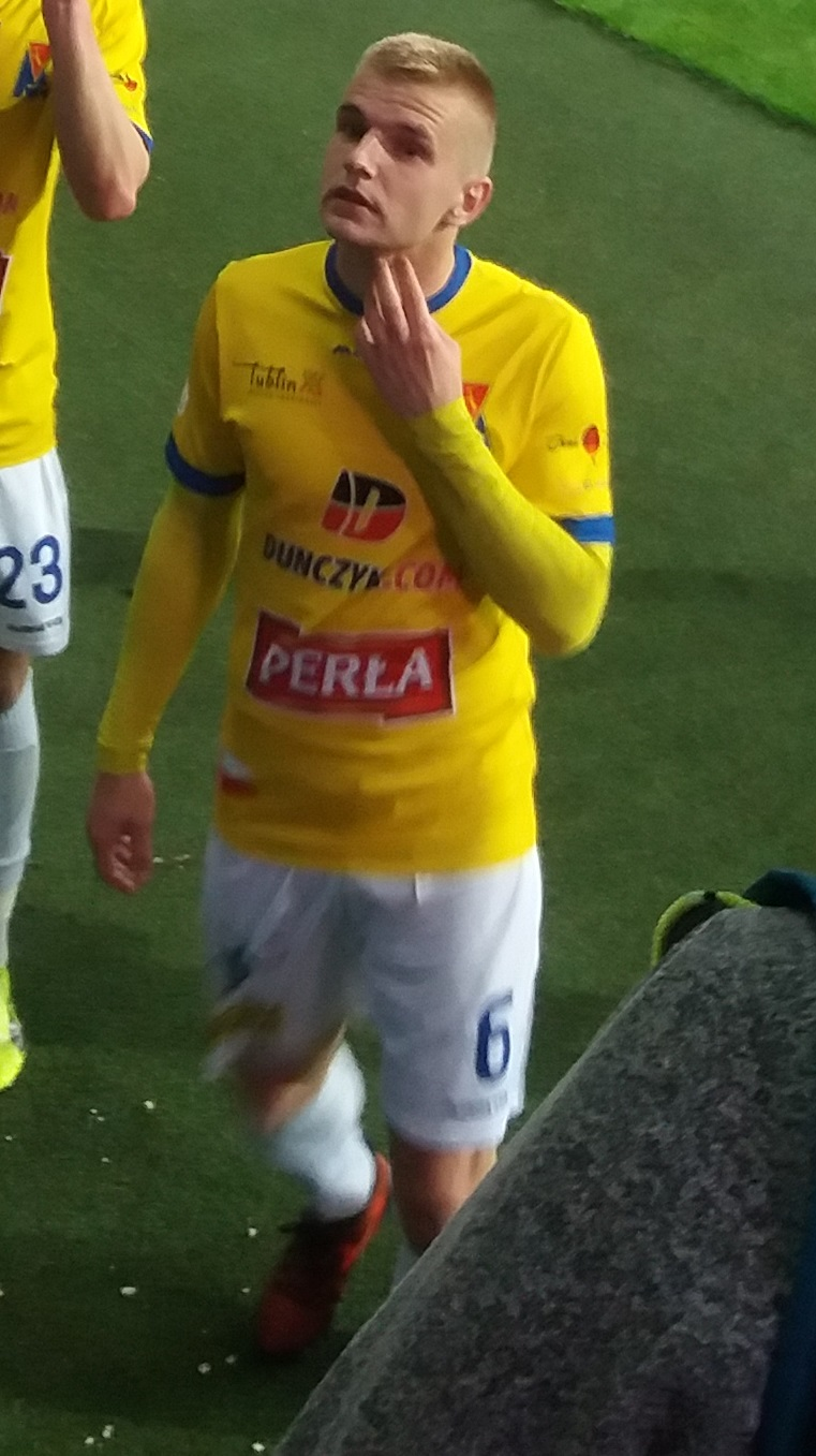 Tomasz Tymosiak - Motor Lublin (2018)